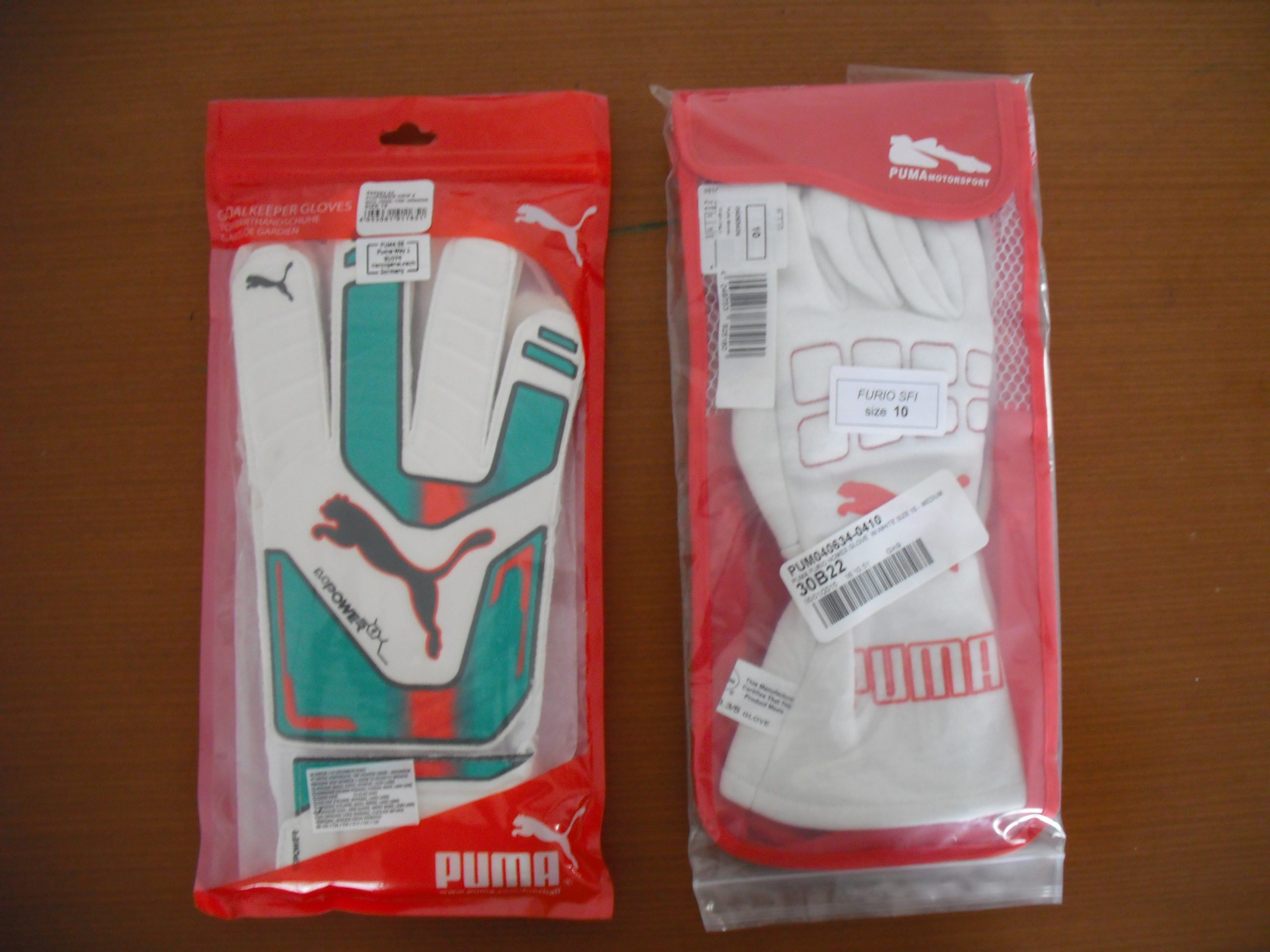 Sarung tangan kiper dan sarung tangan pembalap dari Puma